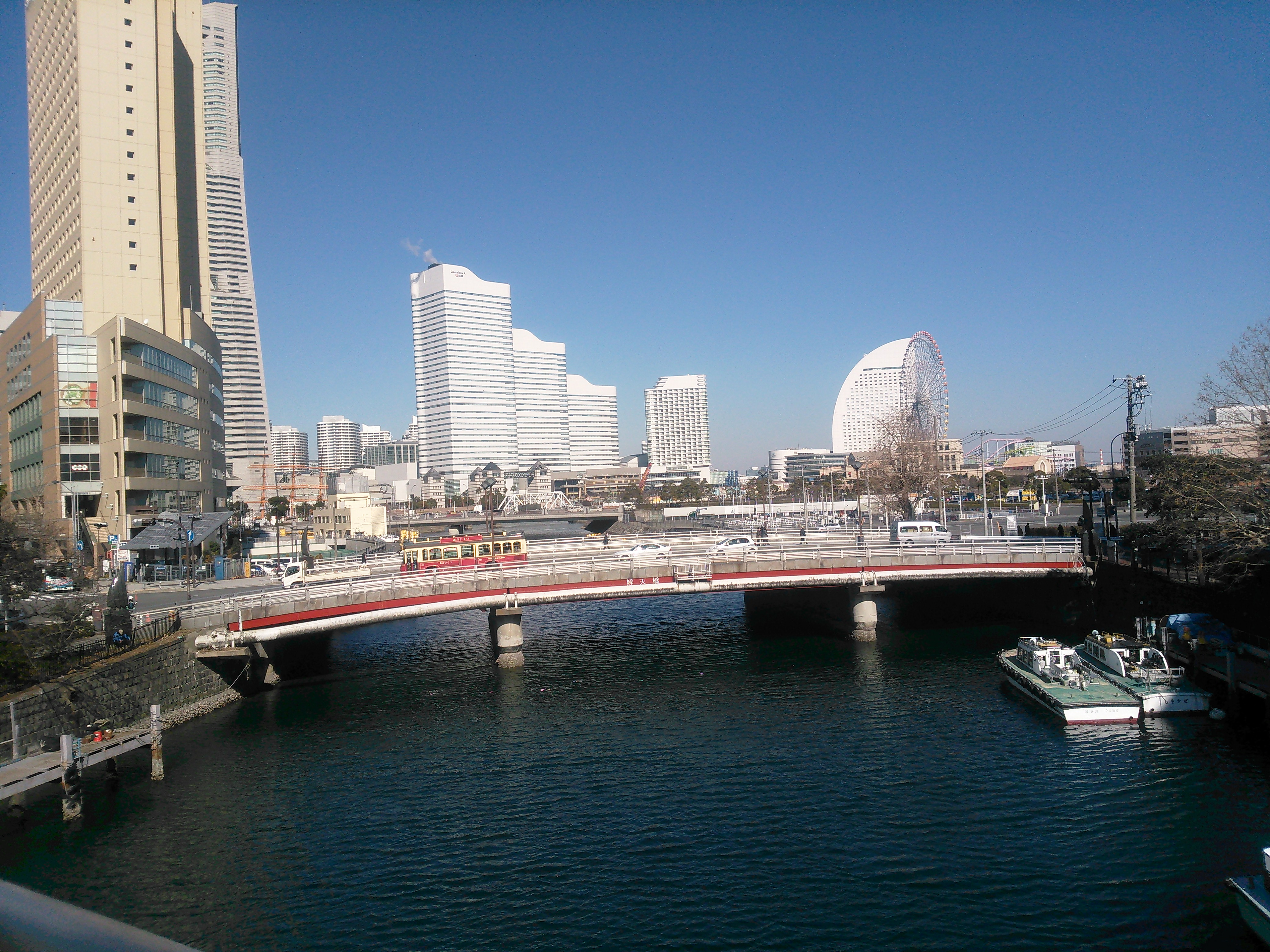 弁天橋。上流側の住吉橋より下流（北）の方向を見る。横浜市中区。左手の高いビルはクロスゲート。地図はこちら。